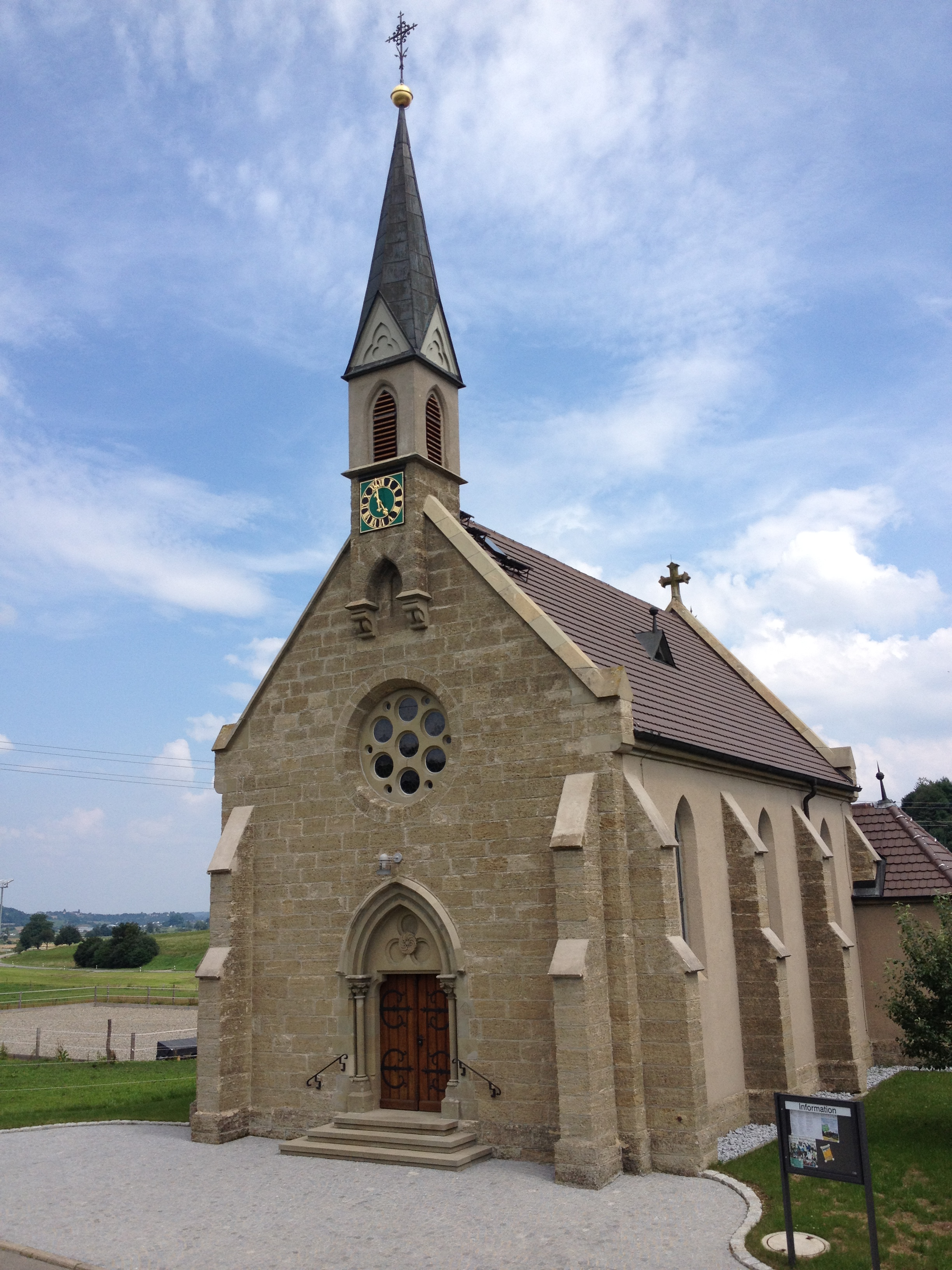 Kapelle St. Josef im Meßkircher Stadtteil Ringgenbach